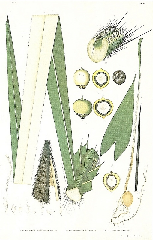 A. Astrocaryum yauaperyense; B. Astrocaryum princeps var. sulphureum; C. Astrocaryum princeps var. flavum (litografia s/ papel; 60 x 39 cm)